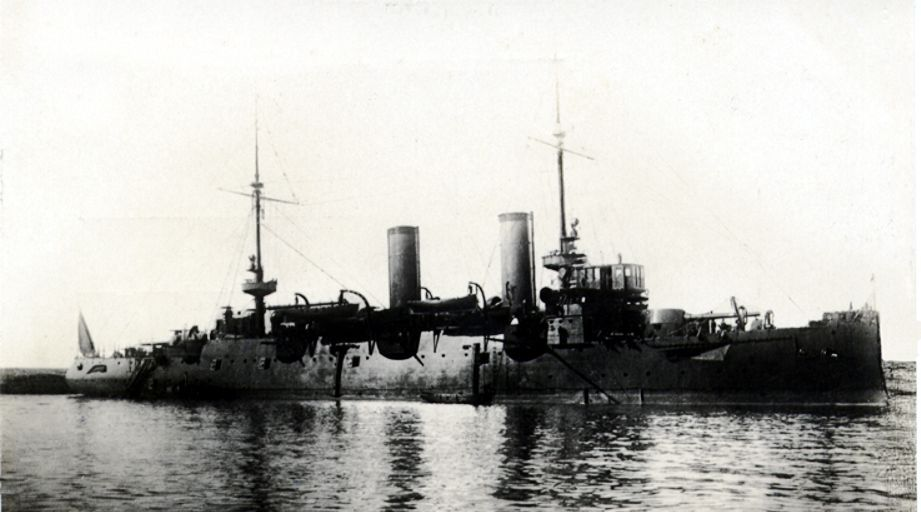 El crucero Cataluña 1809